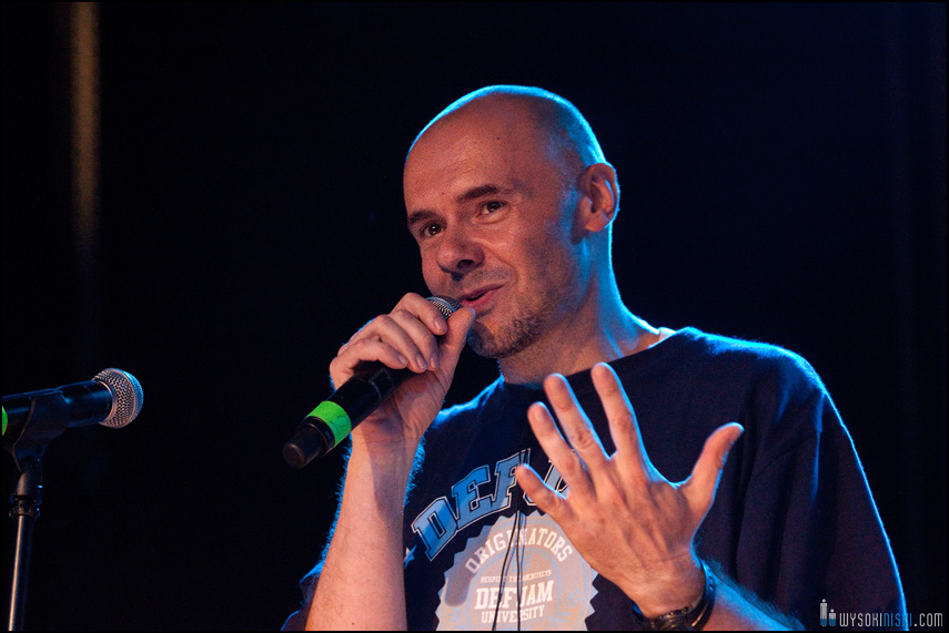 Polish record producer DJ 600V, Warsaw, July 17, 2010